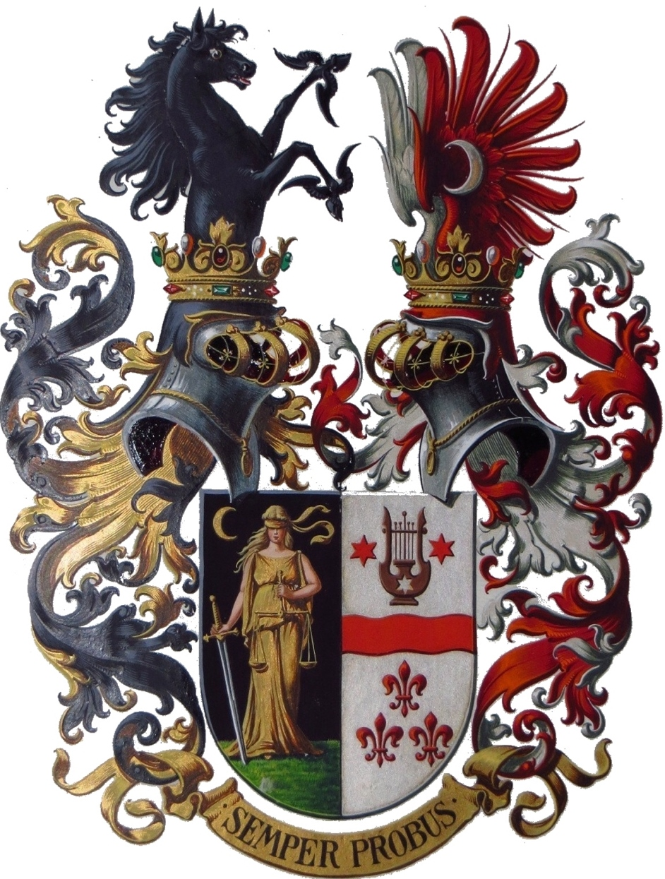 Wappen der ersten Namensträger des Doppelnamens Hardt-Stremayr